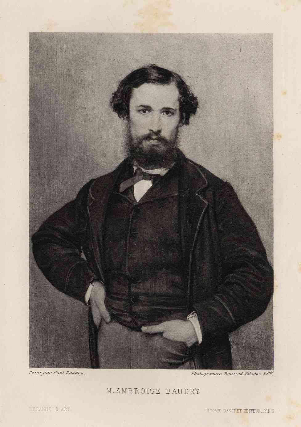 Estampe d'Ambroise Baudry. Peint par Paul Baudry. Photogravure de Boussod, Valandon et Cie.